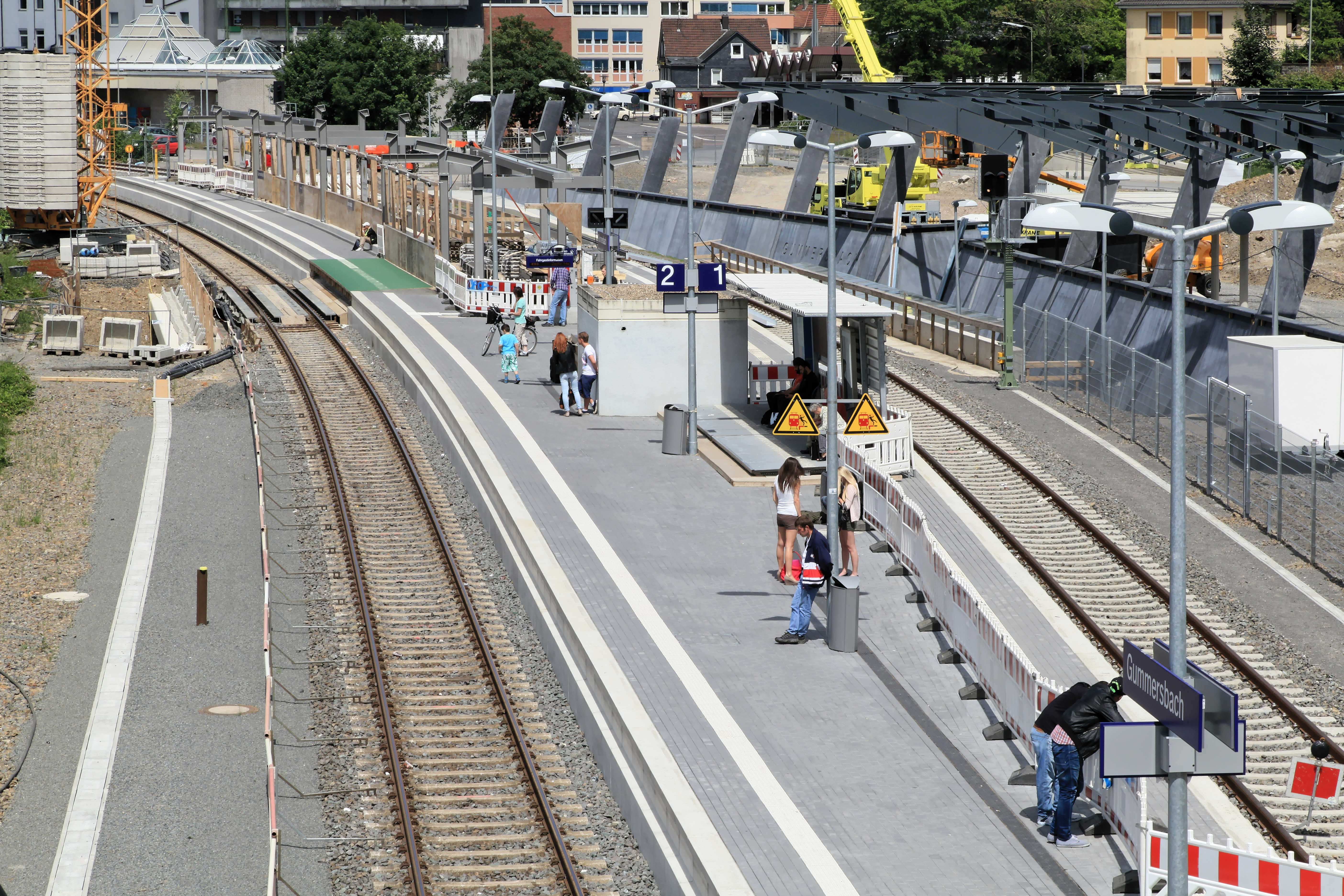 Blick von der Behelfsbrücke auf den Bahnhof Gummersbach während der Bauarbeiten, Bahnhofstraße in Gummersbach